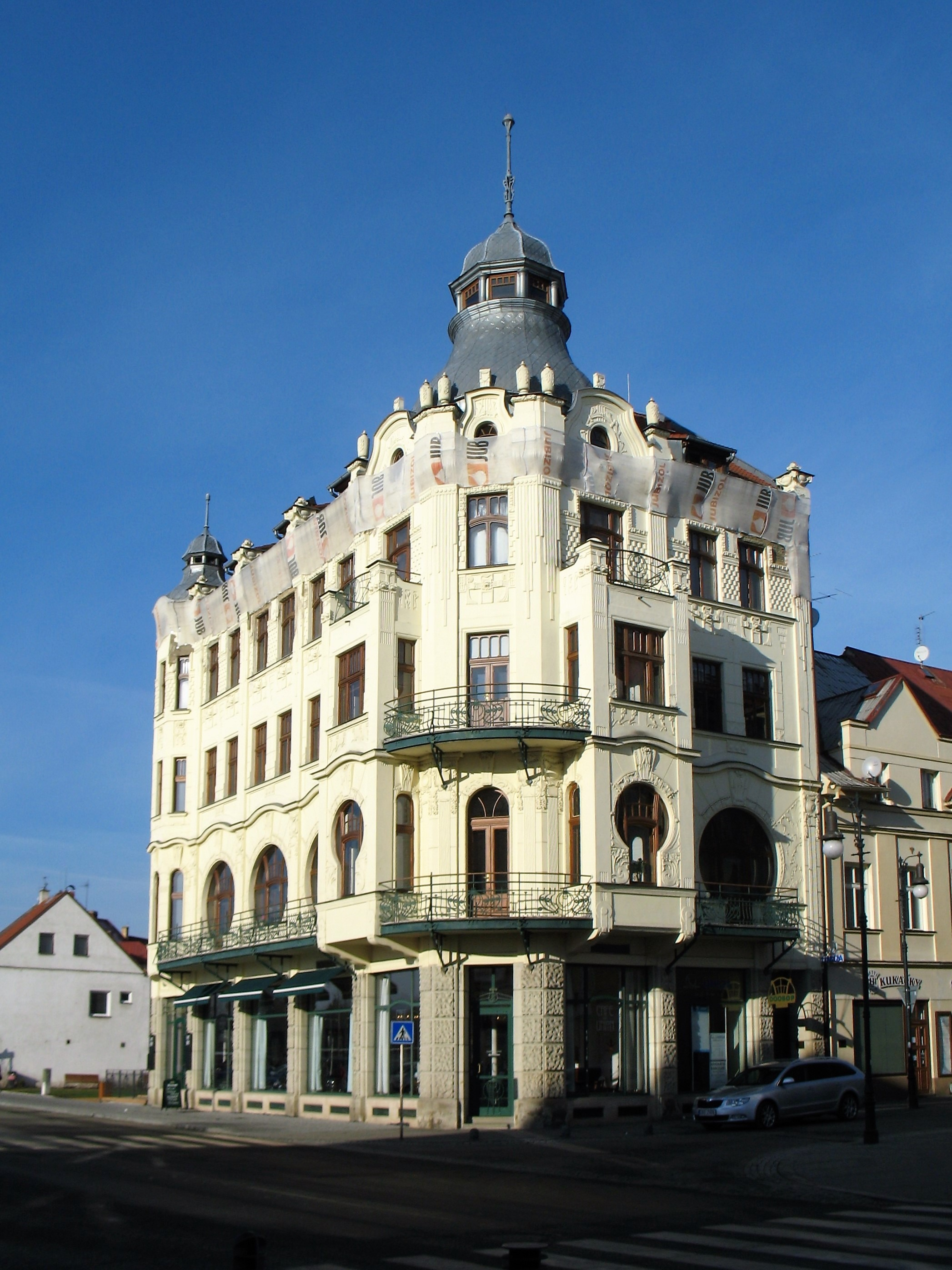 Secesní budova kavárny Union na rohu ulic Sokolské a Jindřicha z Lipé v České Lípě